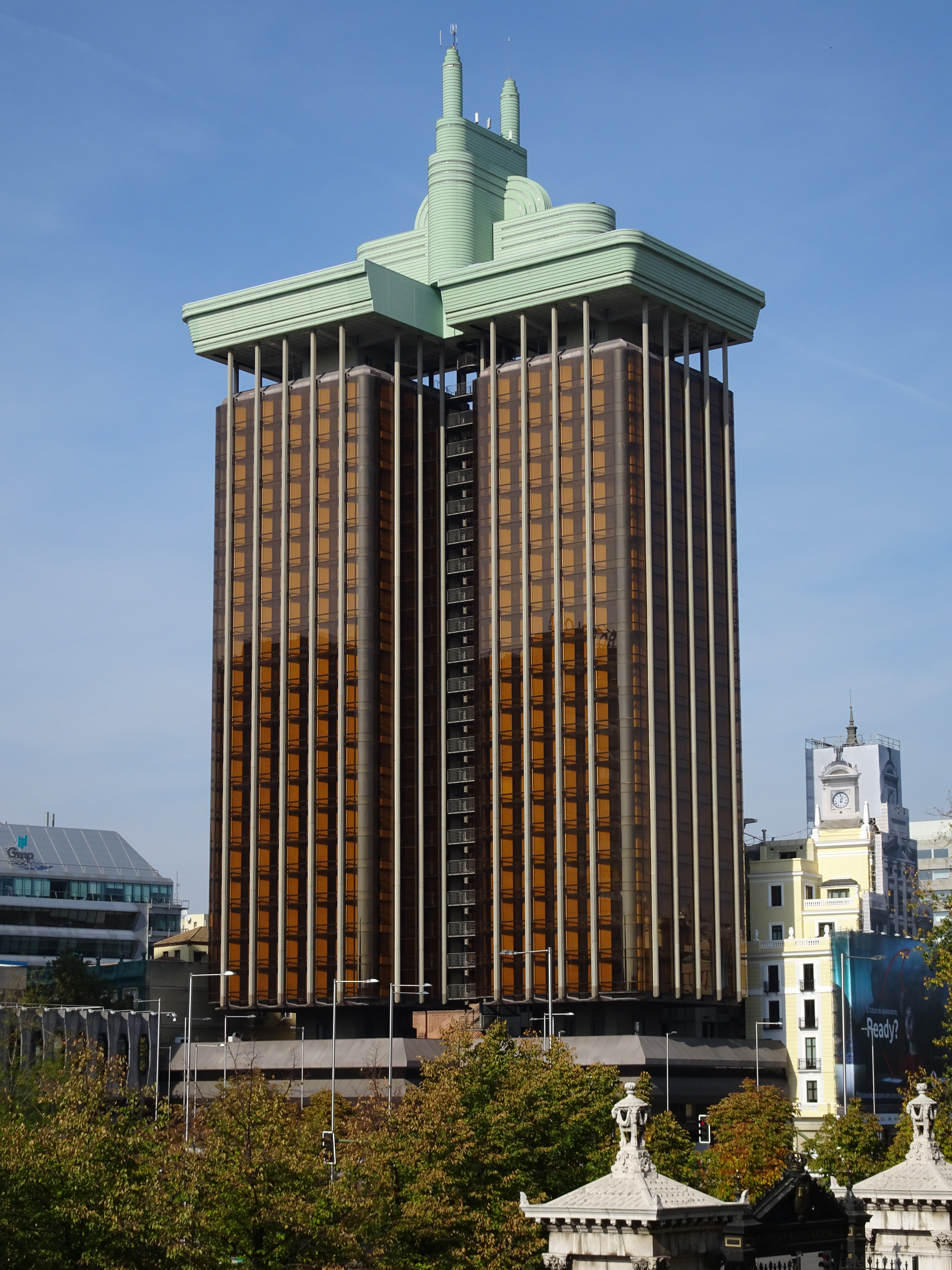 Torres de Colón es el nombre que recibe un rascacielos ubicado en la plaza de Colón de Madrid (España).